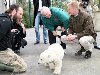 US-Botschafter William Timken und seine Frau Sue besuchten die Sensation in Berlin, das Eisbärbaby Knut im hiesigen Zoo, das weltweit Aufmerksamkeit erregt hat. Der Besuch schloss einen Rundgang durch das Aquarium ein und ein direktes Treffen mit dem Bären, den die Berliner Medien "Cute Knut" getauft haben. Links im Bild der Tierpfleger Thomas Dörflein, rechts der Tierarzt André Schüle.